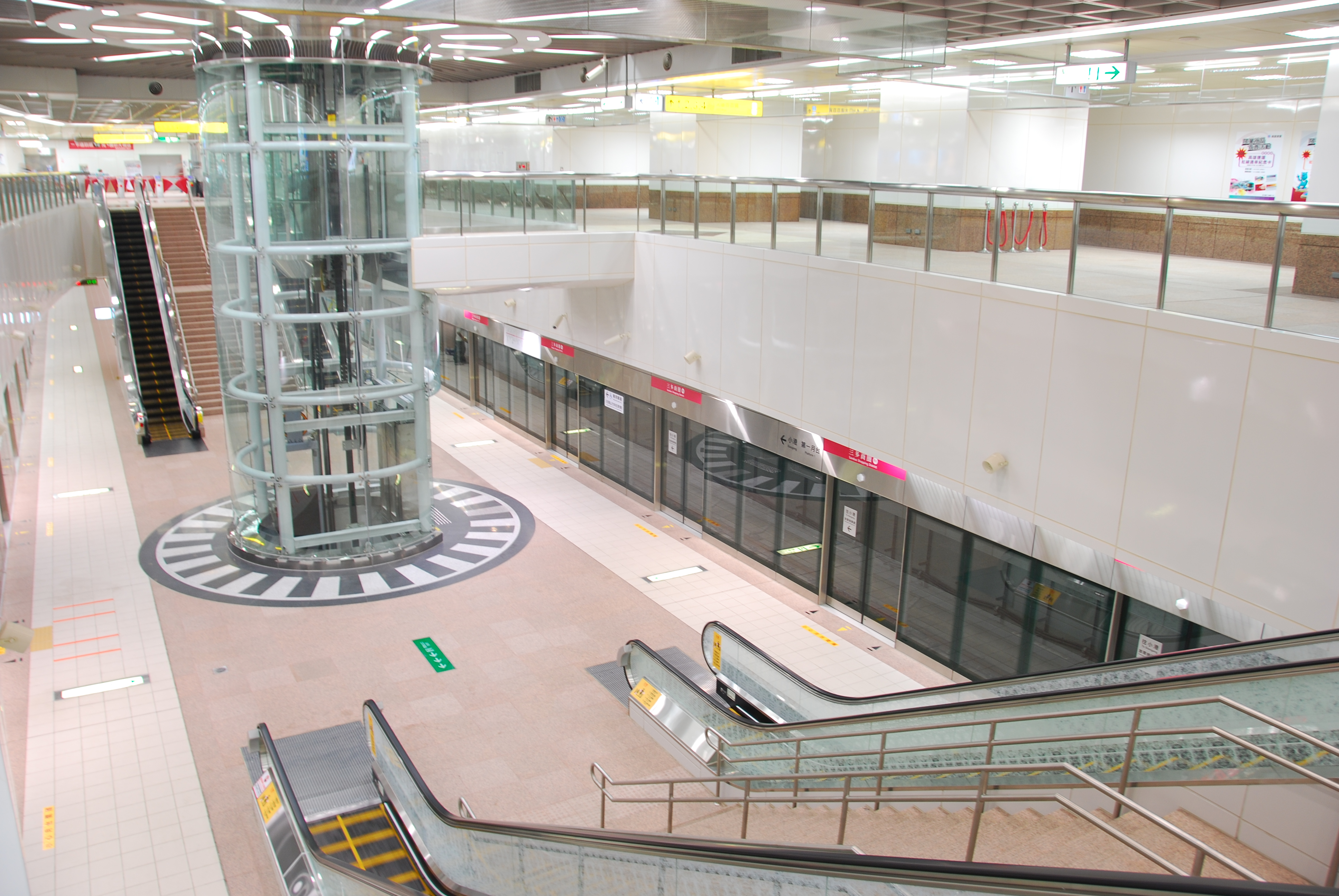 高雄捷運紅線三多商圈站地下月台